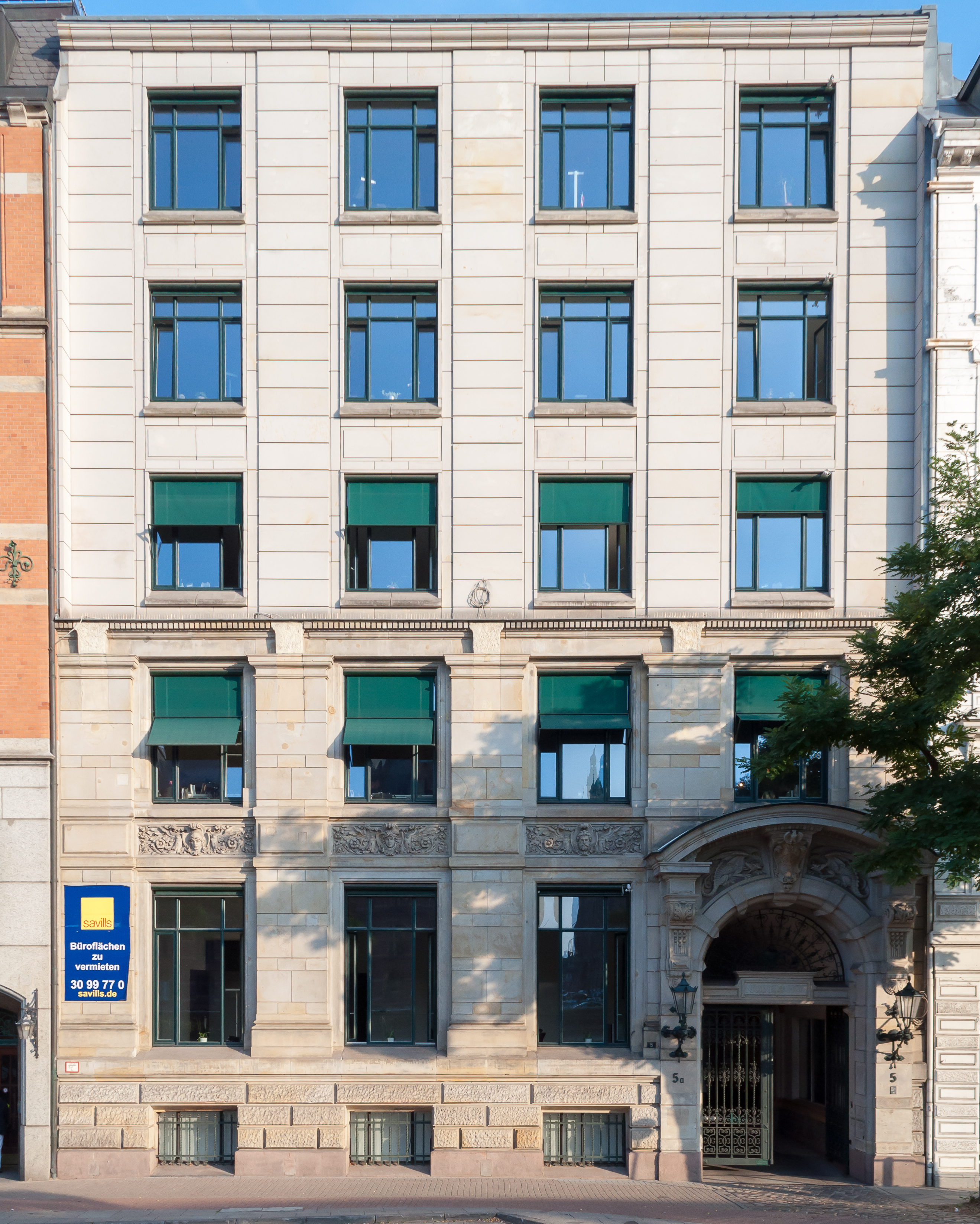 WohngeschäftshausZippelhaus 5 in Hamburg-Altstadt (Seehaus). This is a photograph of an architectural monument.